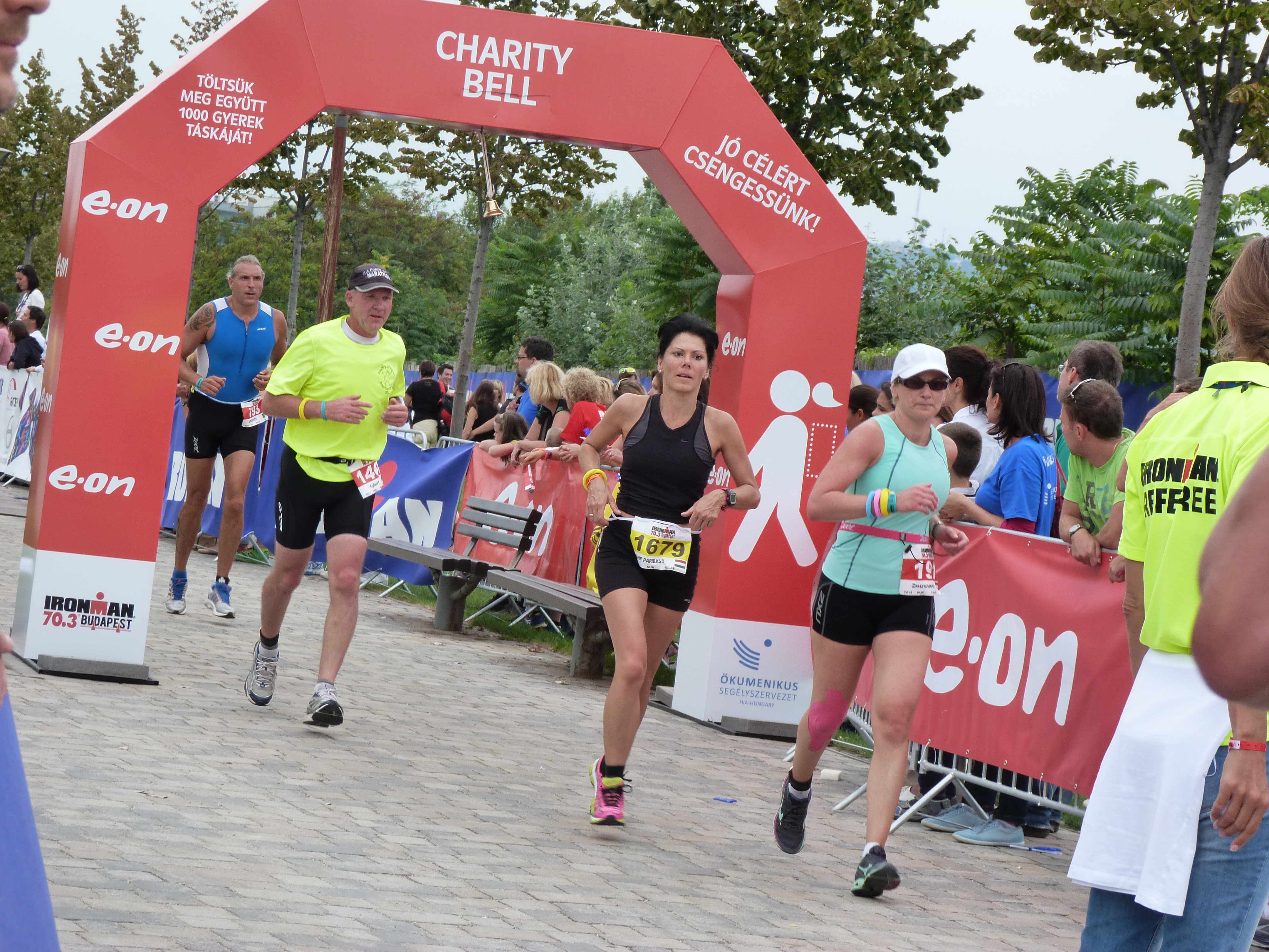 ©© Derzsi Elekes Andor, Budapest 2014, You are authorised to use these photos and vids under Creative Commons – even for commercial, for profit purposes. Photos must be attributed to Derzsi Elekes Andor. All of the photos and vids in the Metapolisz DVD line are under Creative Commons and can be used even for commercial – for profit – purposes. Recommended Citation Derzsi Elekes Andor: Metapolisz DVD line